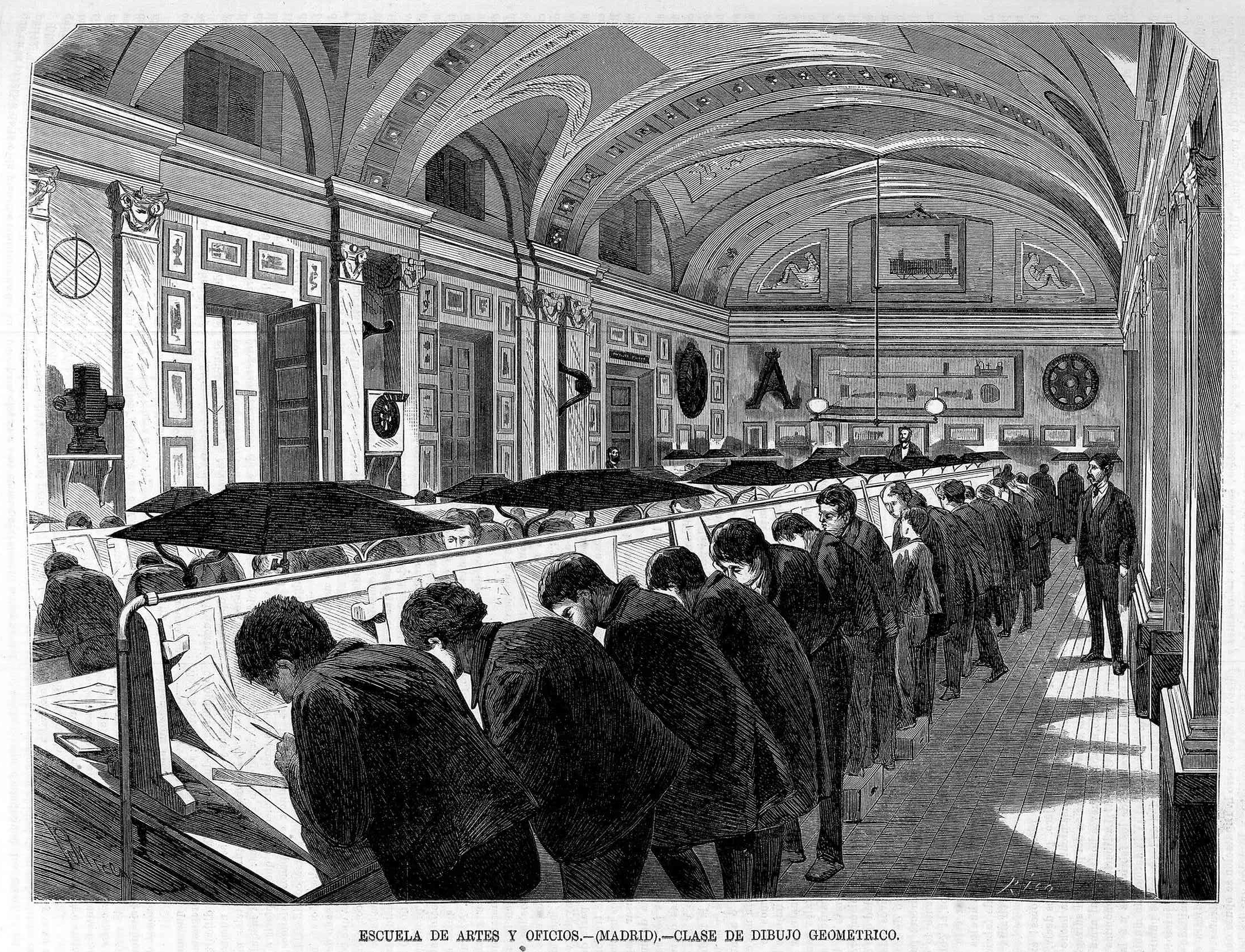 Escuela de Artes y Oficios (Madrid). Clase de dibujo geométrico.